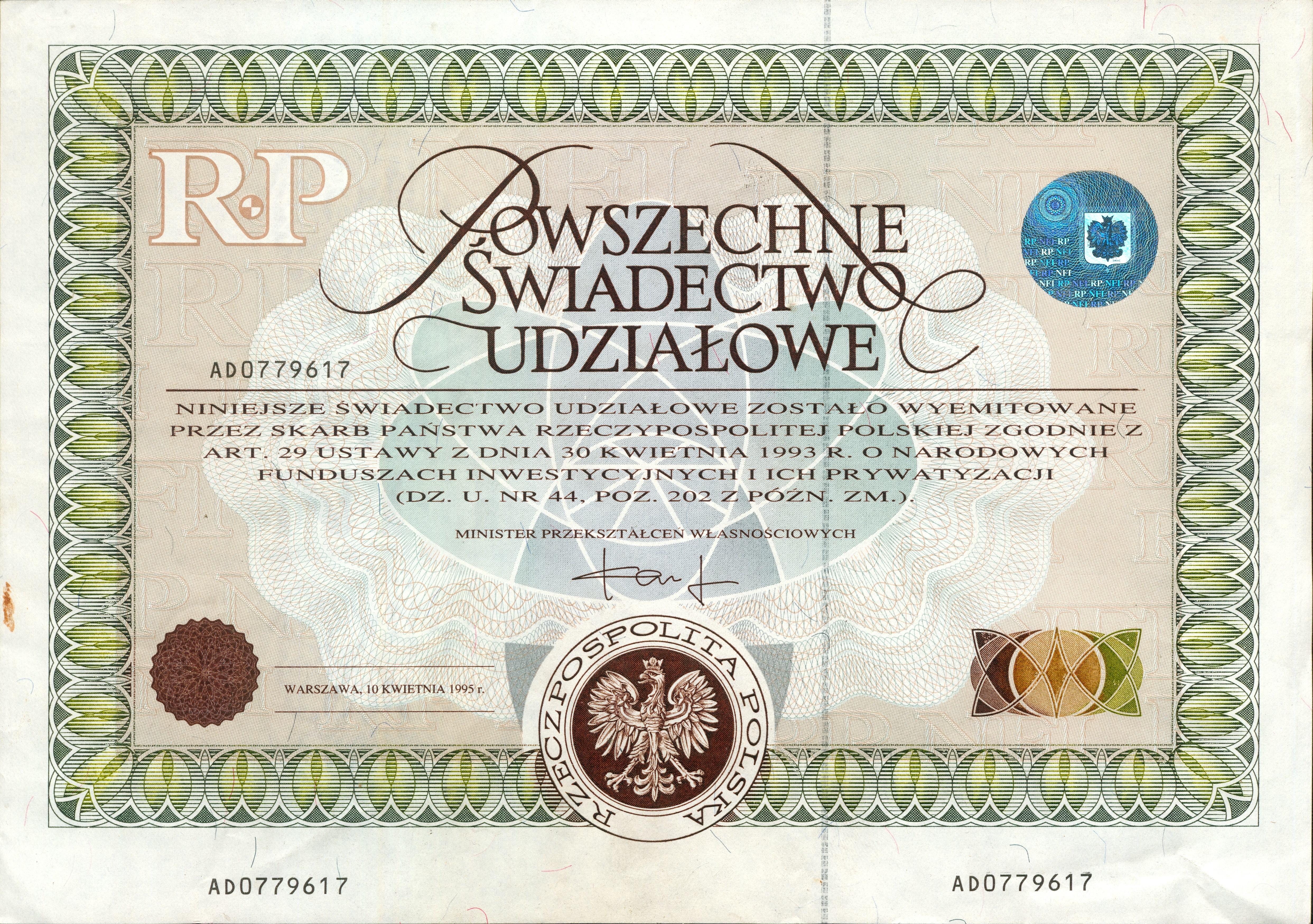 Archiwalny egzemplarz Powszechnego Świadectwa Udziałowego NFI, papier wartościowy na okaziciela wydane na podstawie ustawy o narodowych funduszach inwestycyjnych